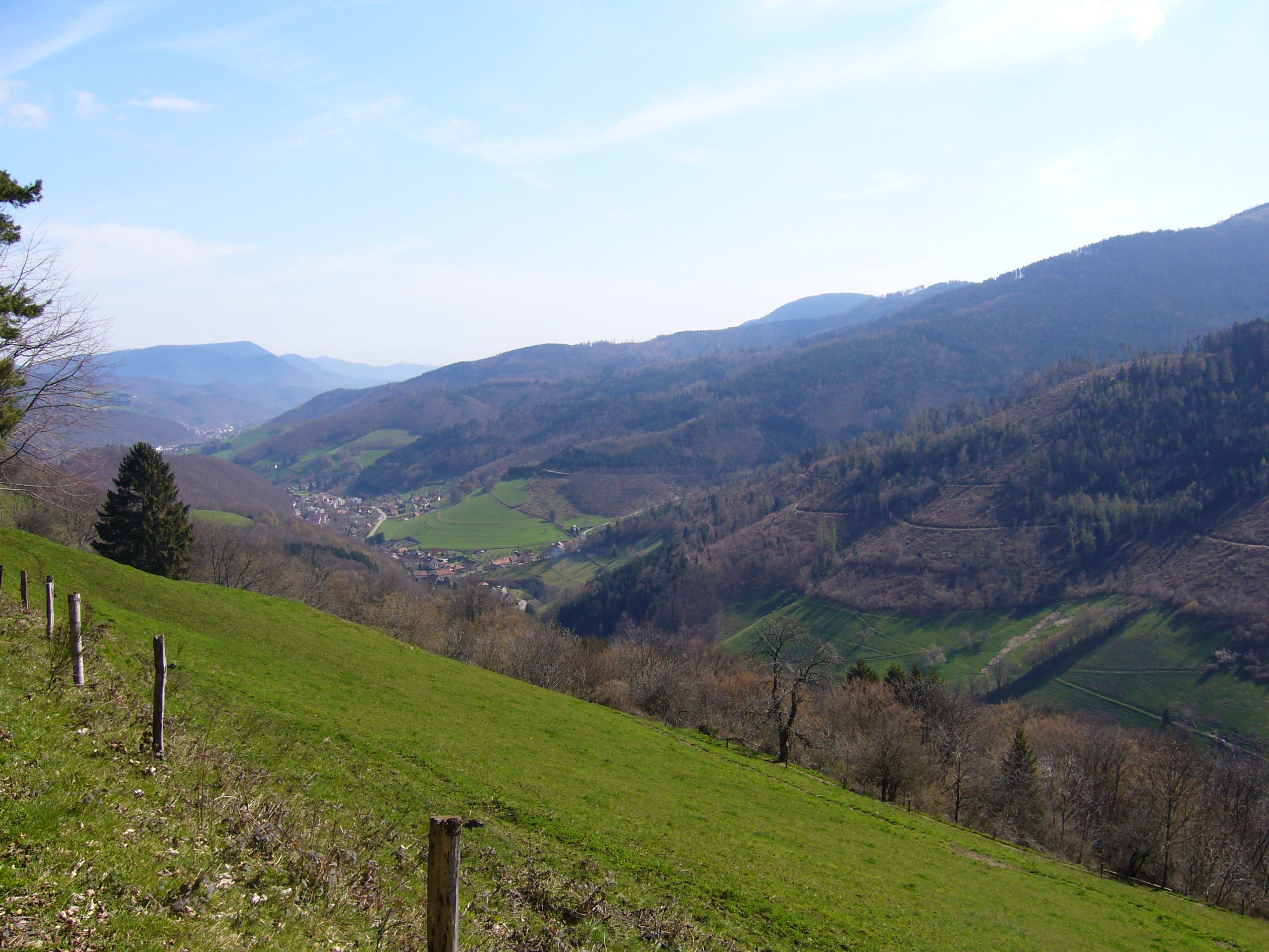 Sainte Marie-aux-Mines 122.JPG